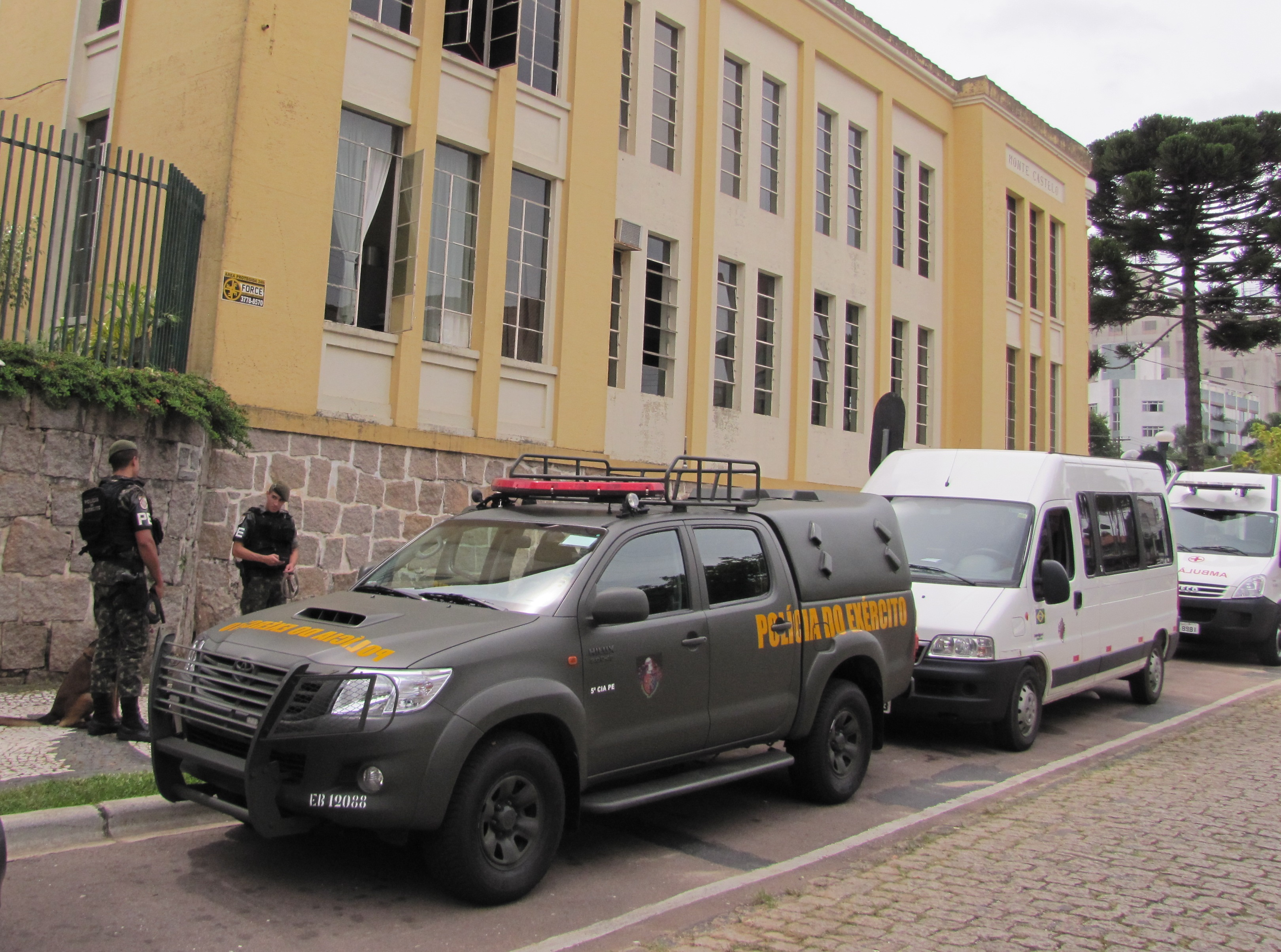 Viatura da 5ª Companhia de Polícia do Exército, 5ª RM.